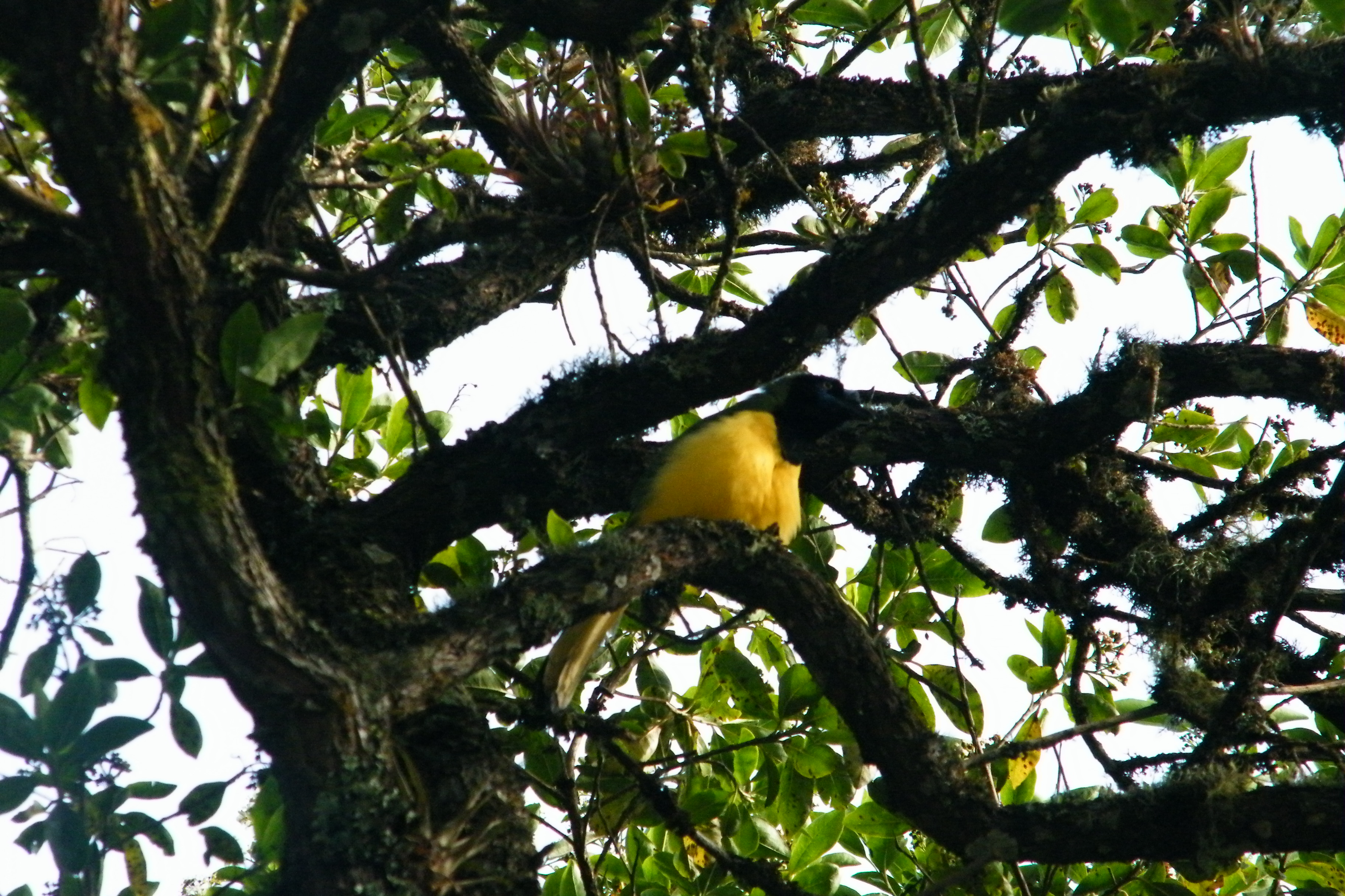 Parque nacional Avila